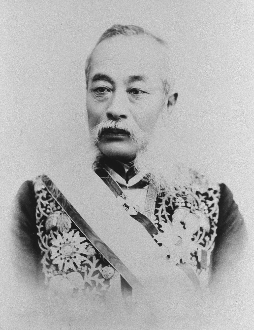 Portrait of Otori Keisuke (大鳥圭介, 1833 – 1911)